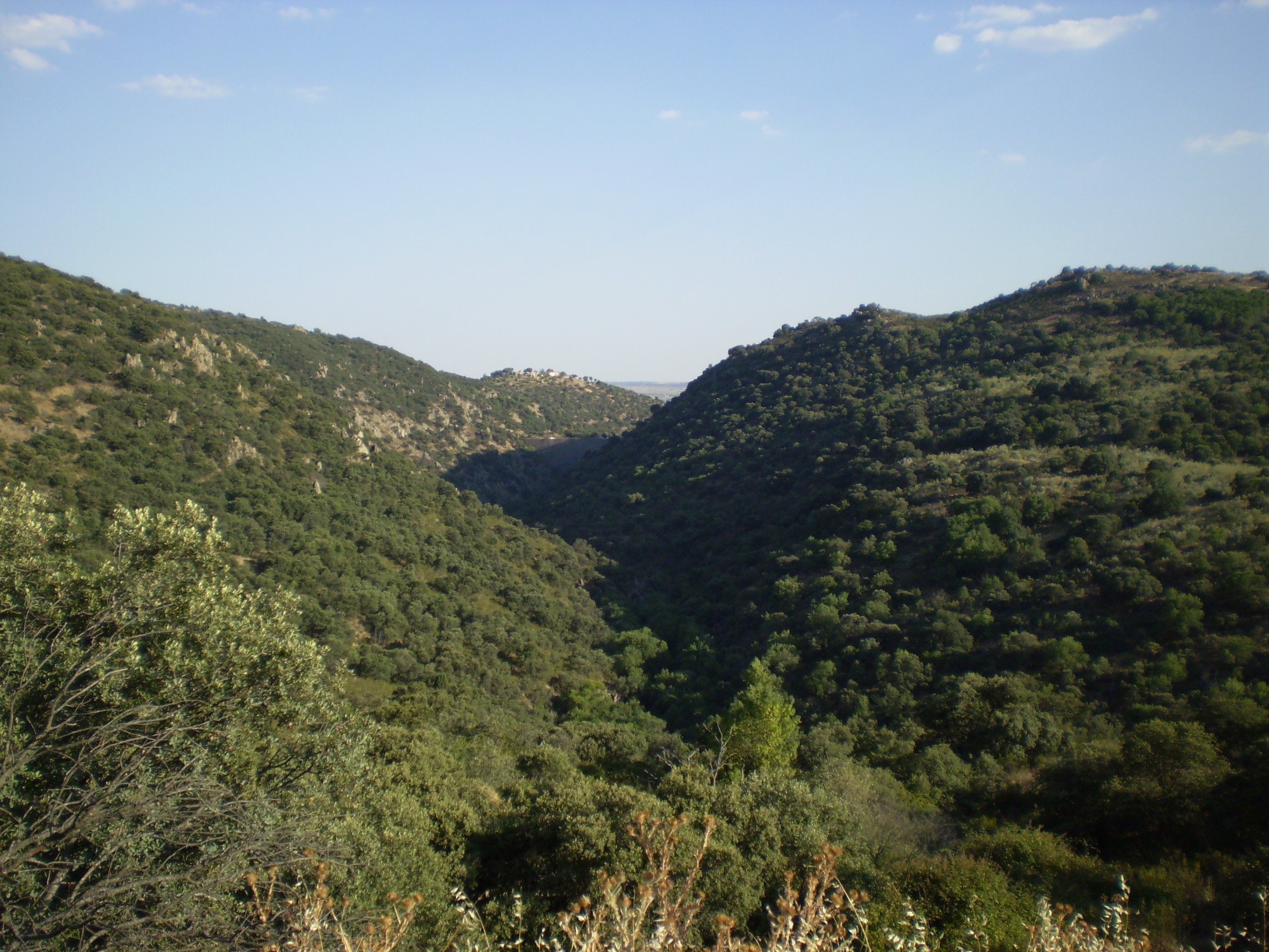 Monte de El Gasco. Torrelodones, Madrid, Spain